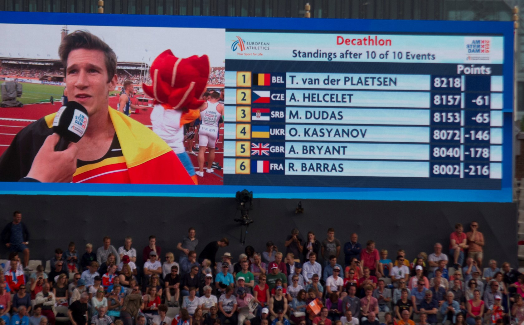 0756 thomas vdp eindstand